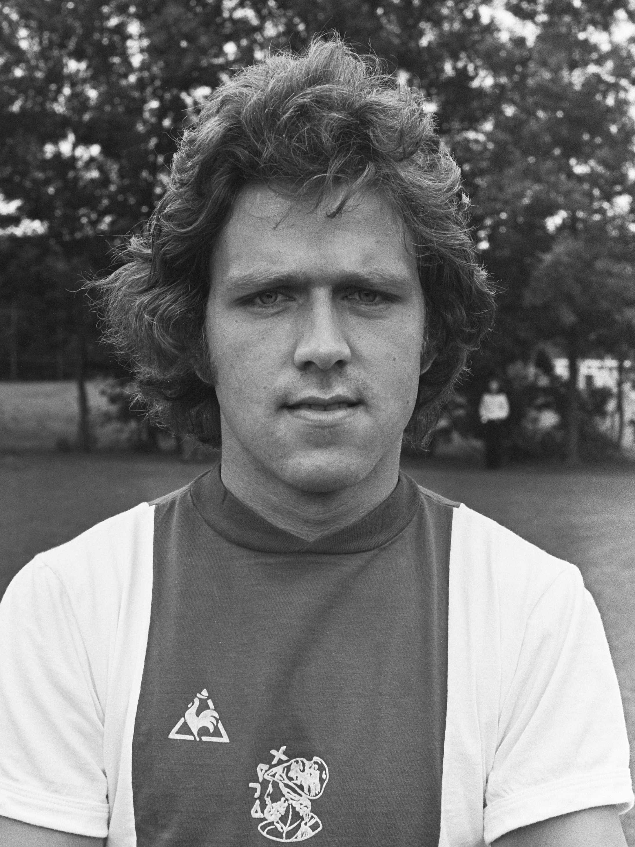 Ajax presenteert de nieuwe selectie voor het aankomende voetbalseizoen 1975-1976; Geert Meijer 15 juli 1975